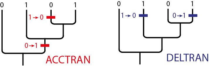 ambigue